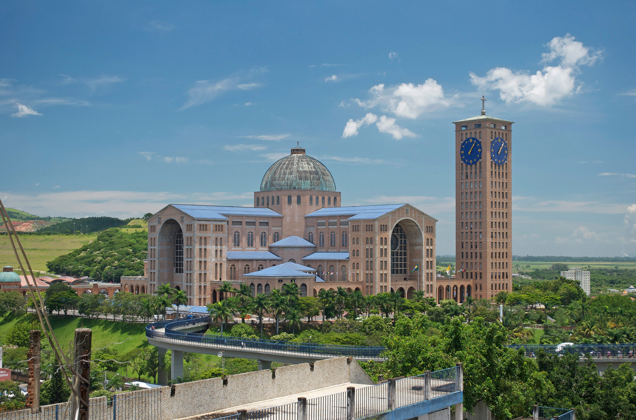 Basílica de Nossa Senhora de Aparecida